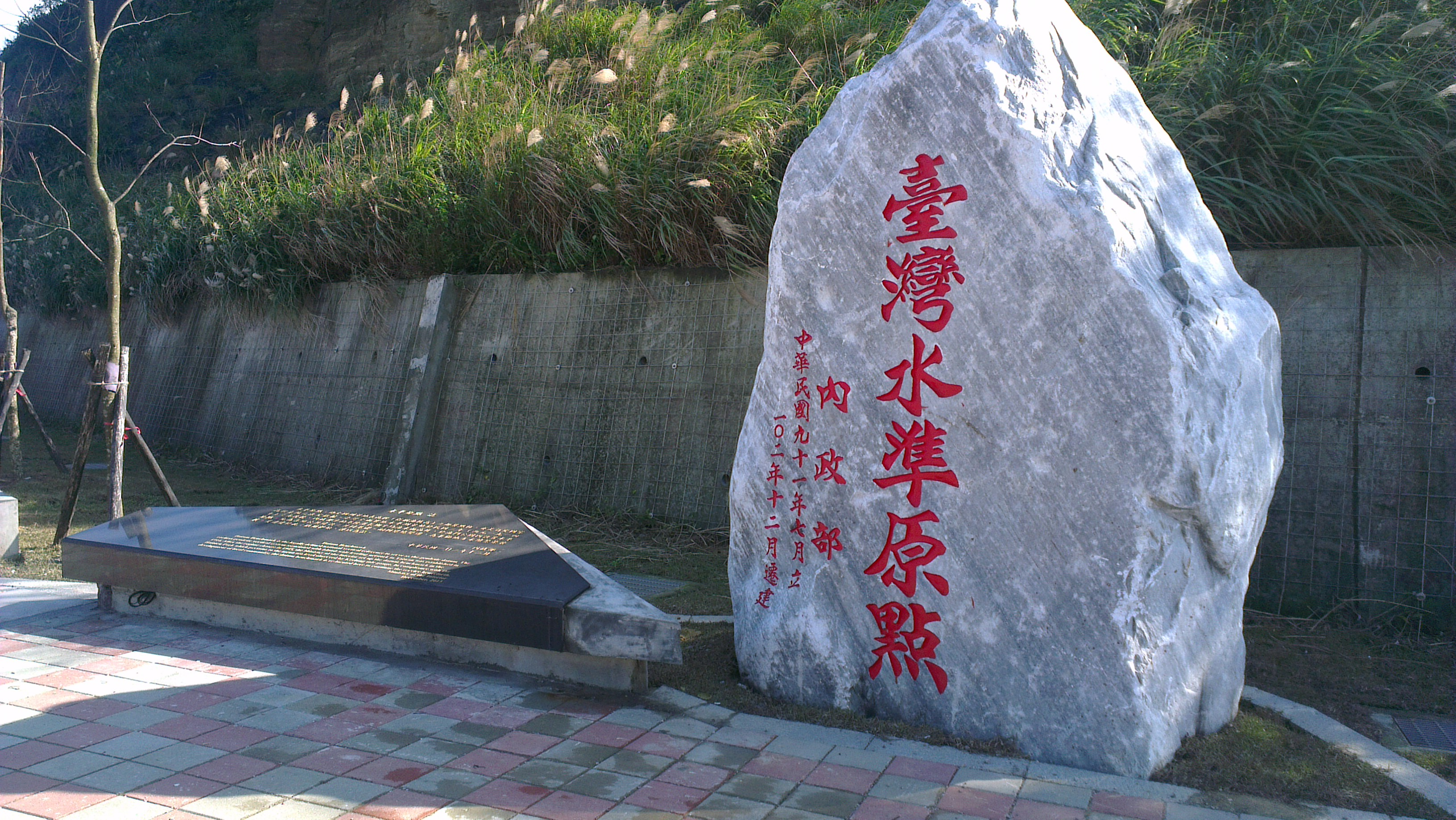 中文（台灣）: 中華民國內政部臺灣水準原點石碑